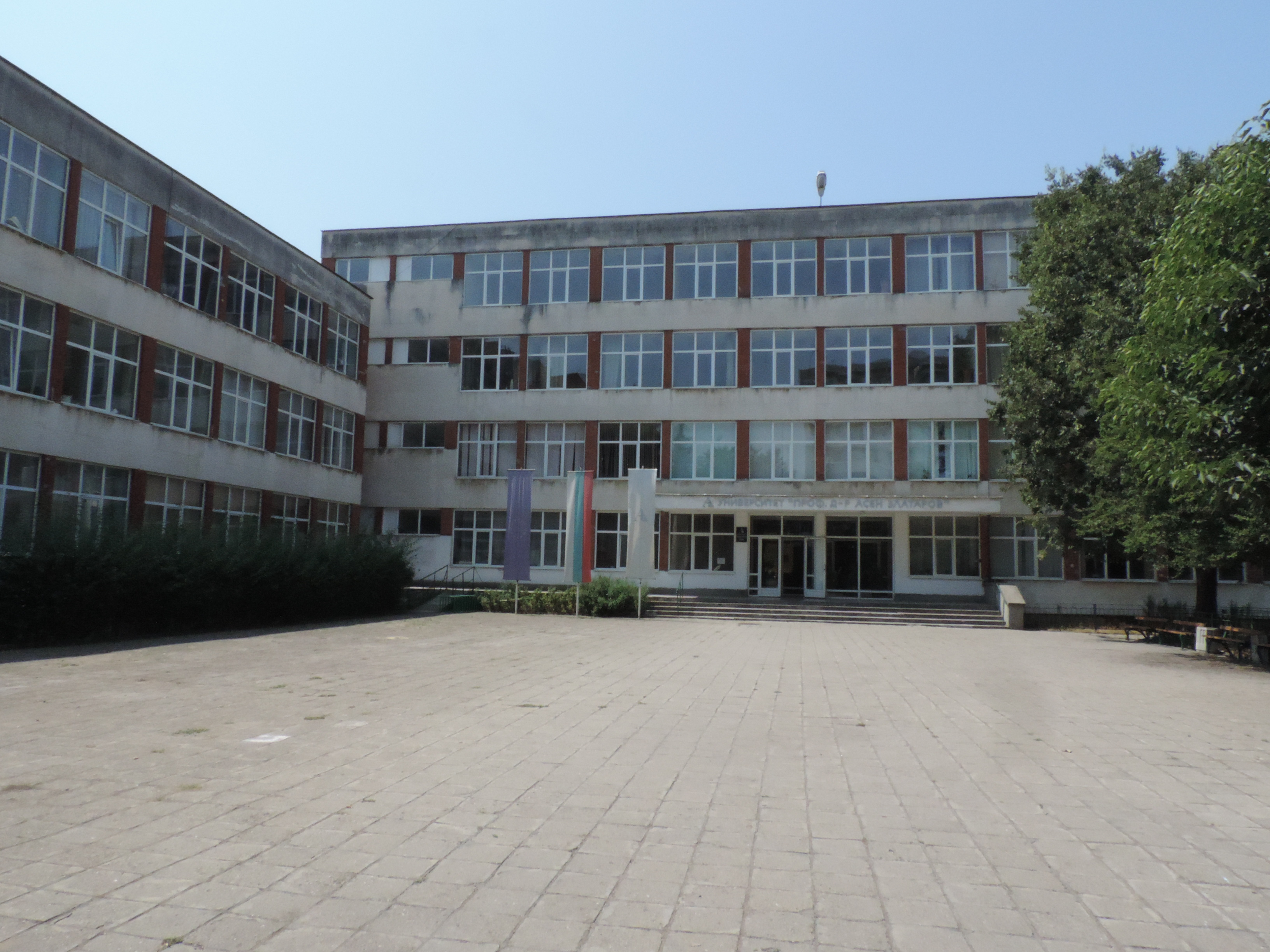 Университет „Проф. Асен Златаров“, Бургас, Факултет по обществени науки